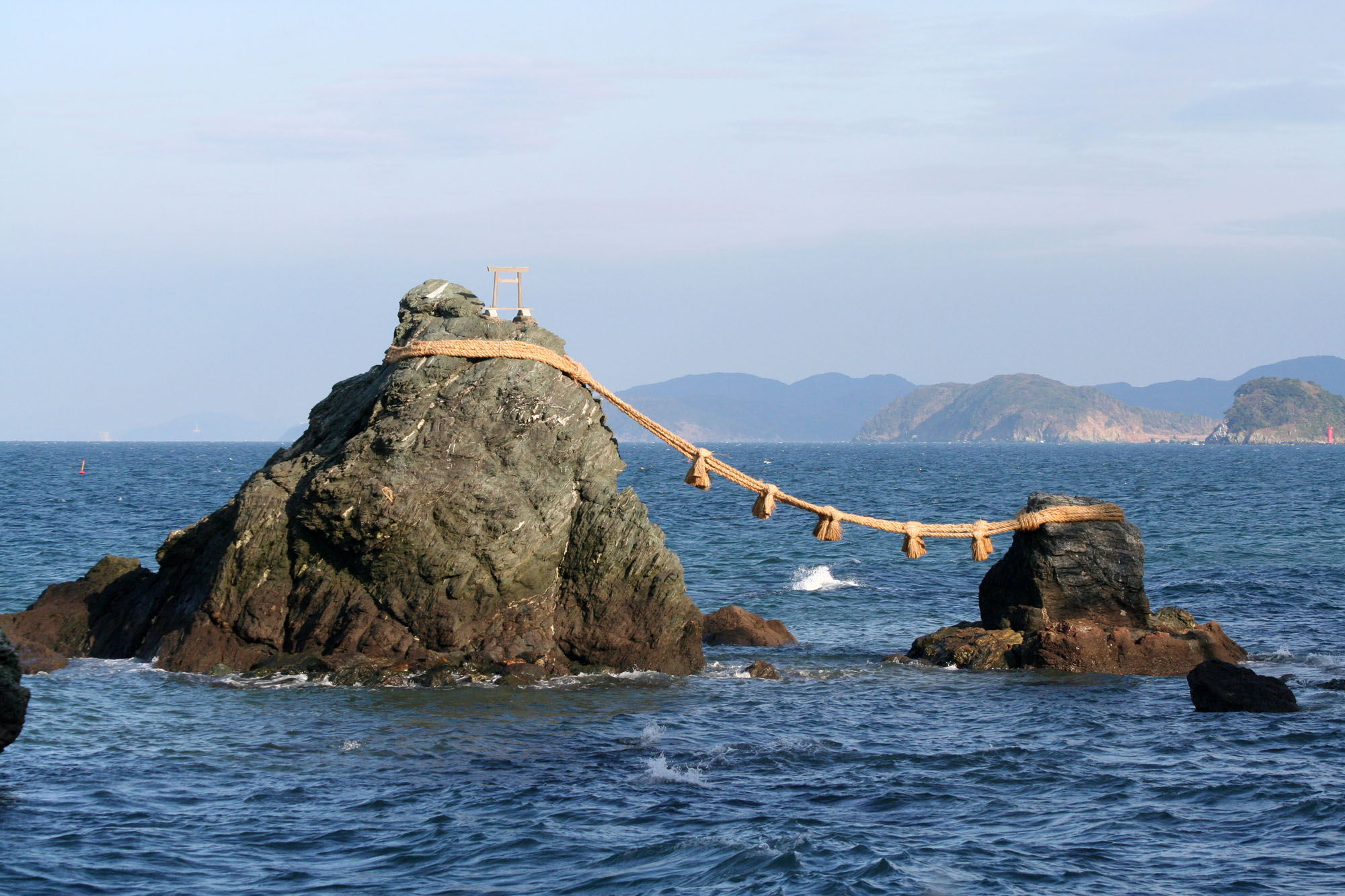 Meoto Iwa